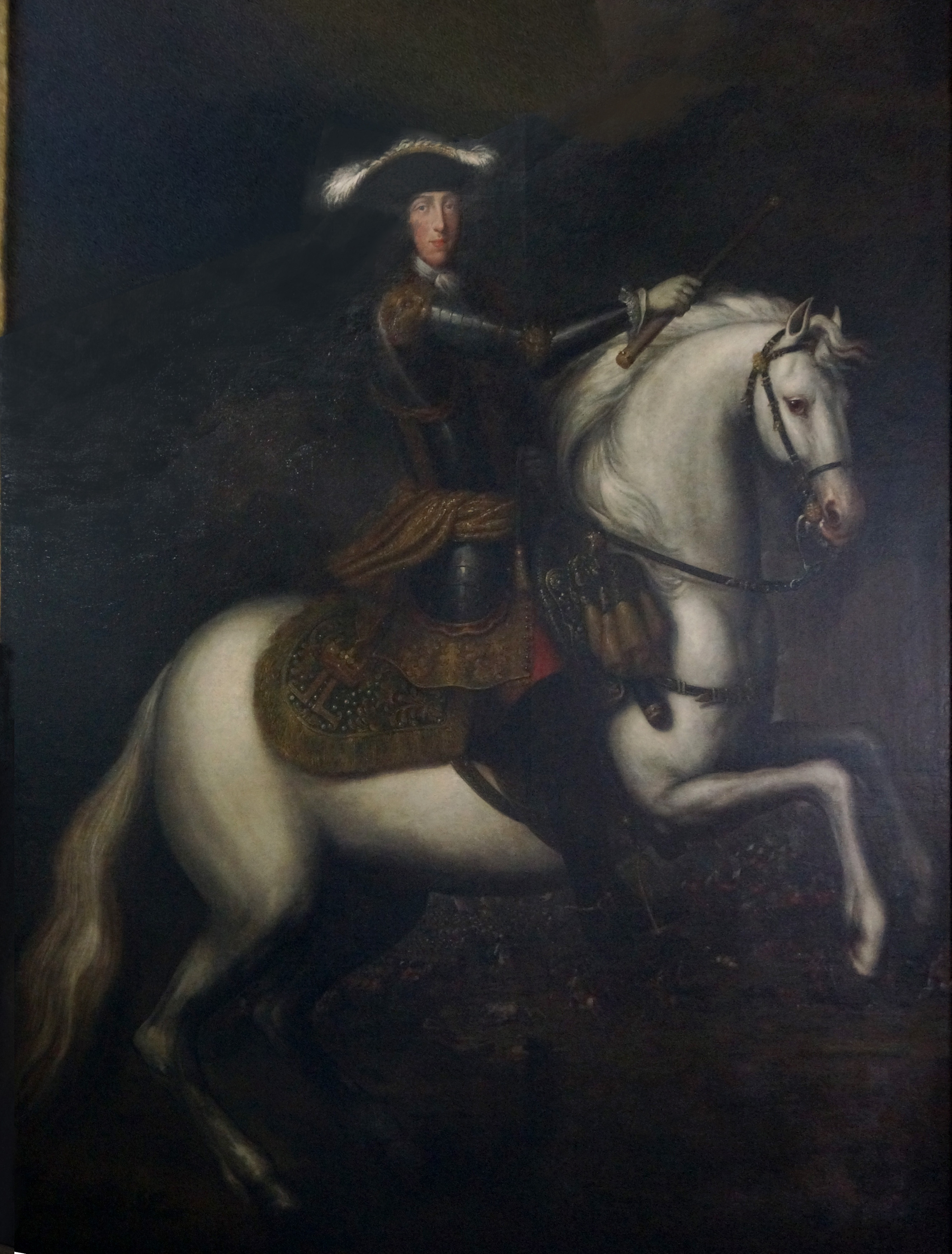 au premier étage du Musée lorrain.